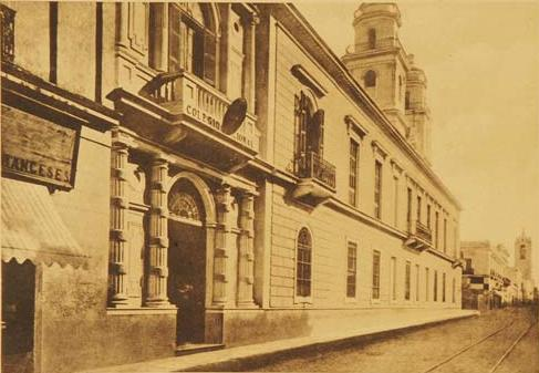 El antiguo edificio del Colegio Nacional de Buenos Aires, construido por los jesuitas en el siglo XVIII. Fue demolido para la construcción de la sede actual, comenzada en 1910 y terminada en 1938, proyectada por Norbert Maillart.